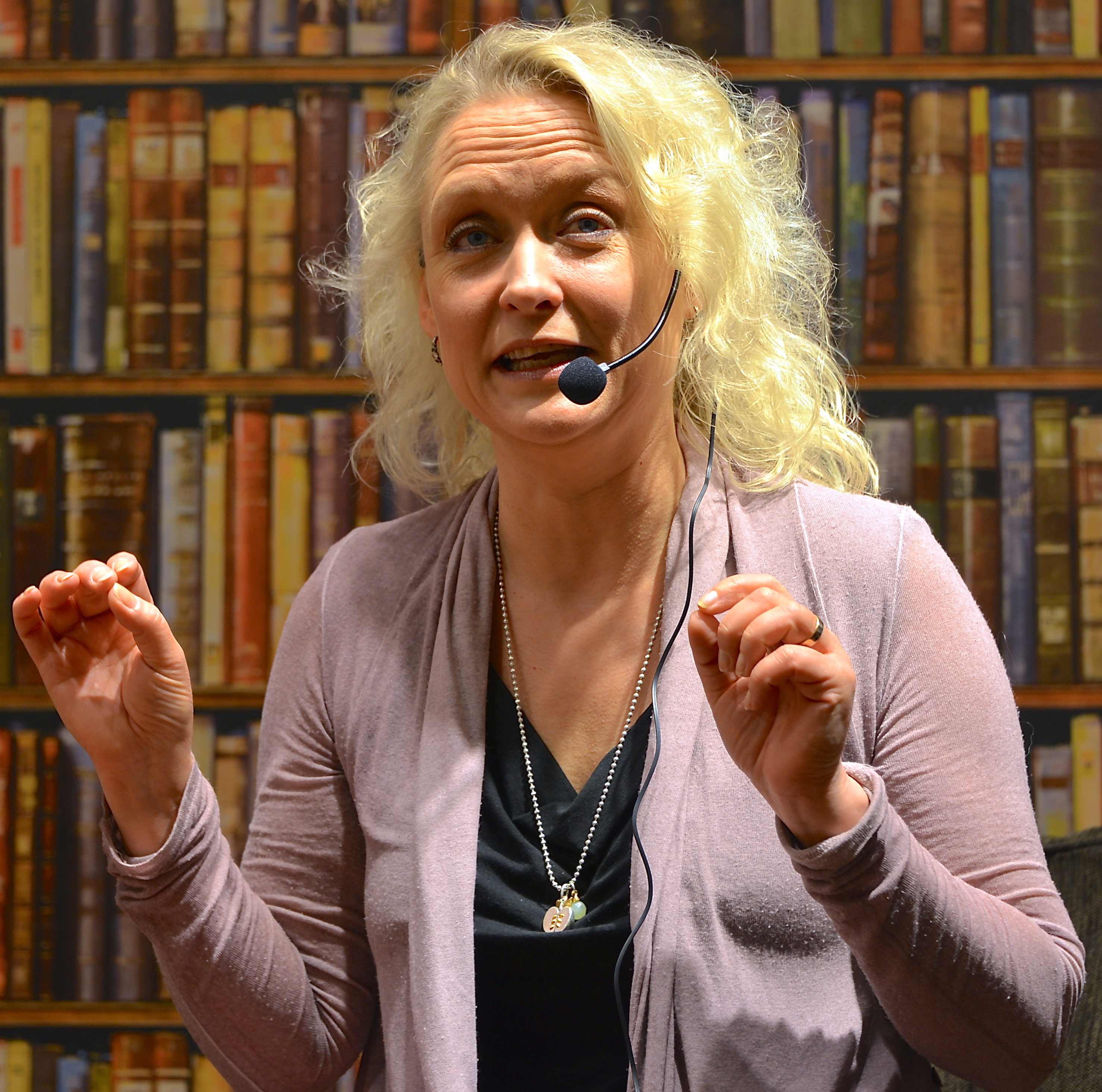 Karin Alvtegen samtalar on sin bok "Fjärilseffekten" på Akademibokhandeln City, Stockholm den 27 april 2013.